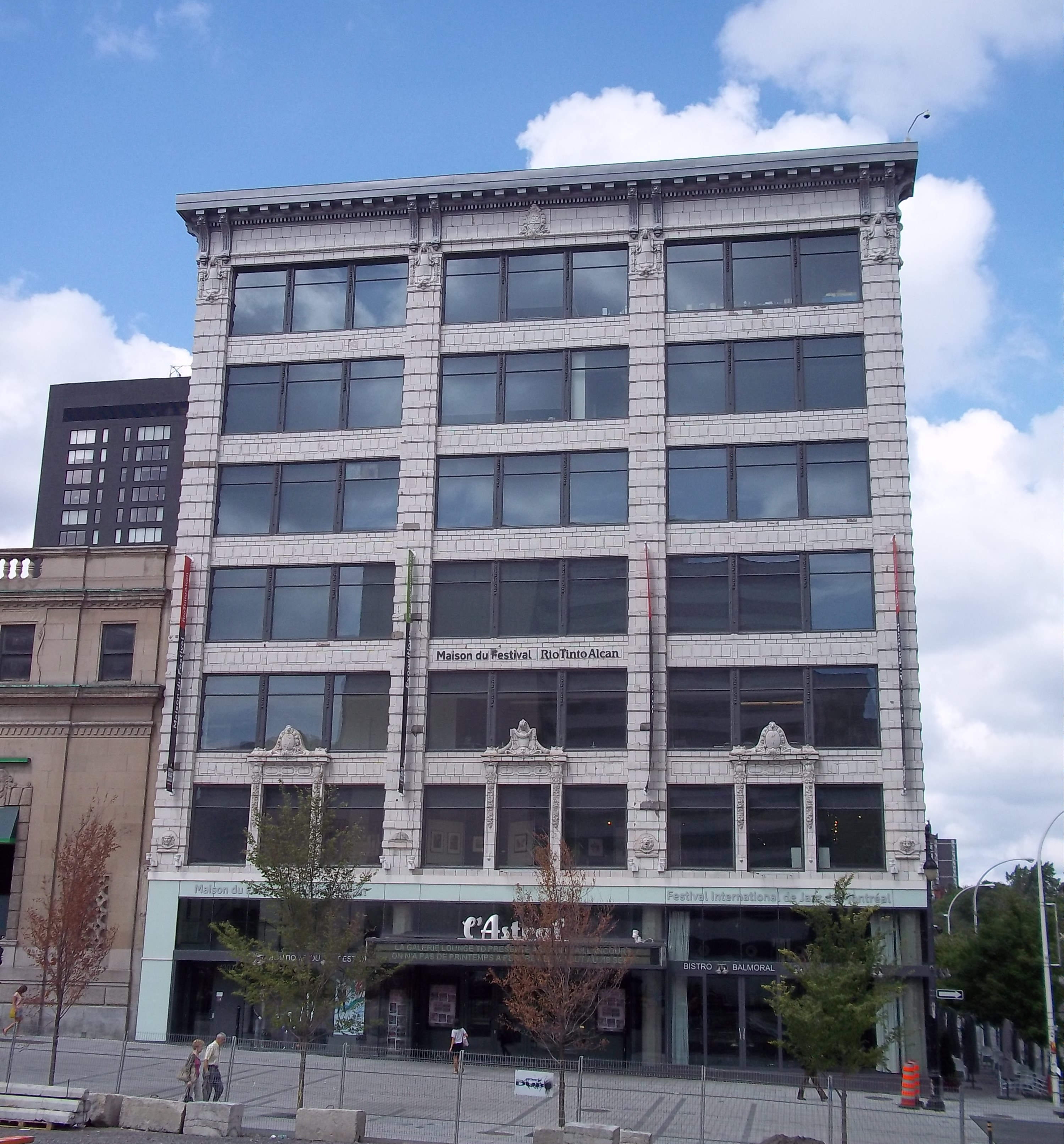 Maison du Festival Rio Tinto Alcan (Édifice Blumenthal), 305-307, rue Sainte-Catherine Ouest, Montréal (info)